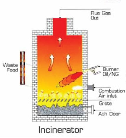 Incinerator